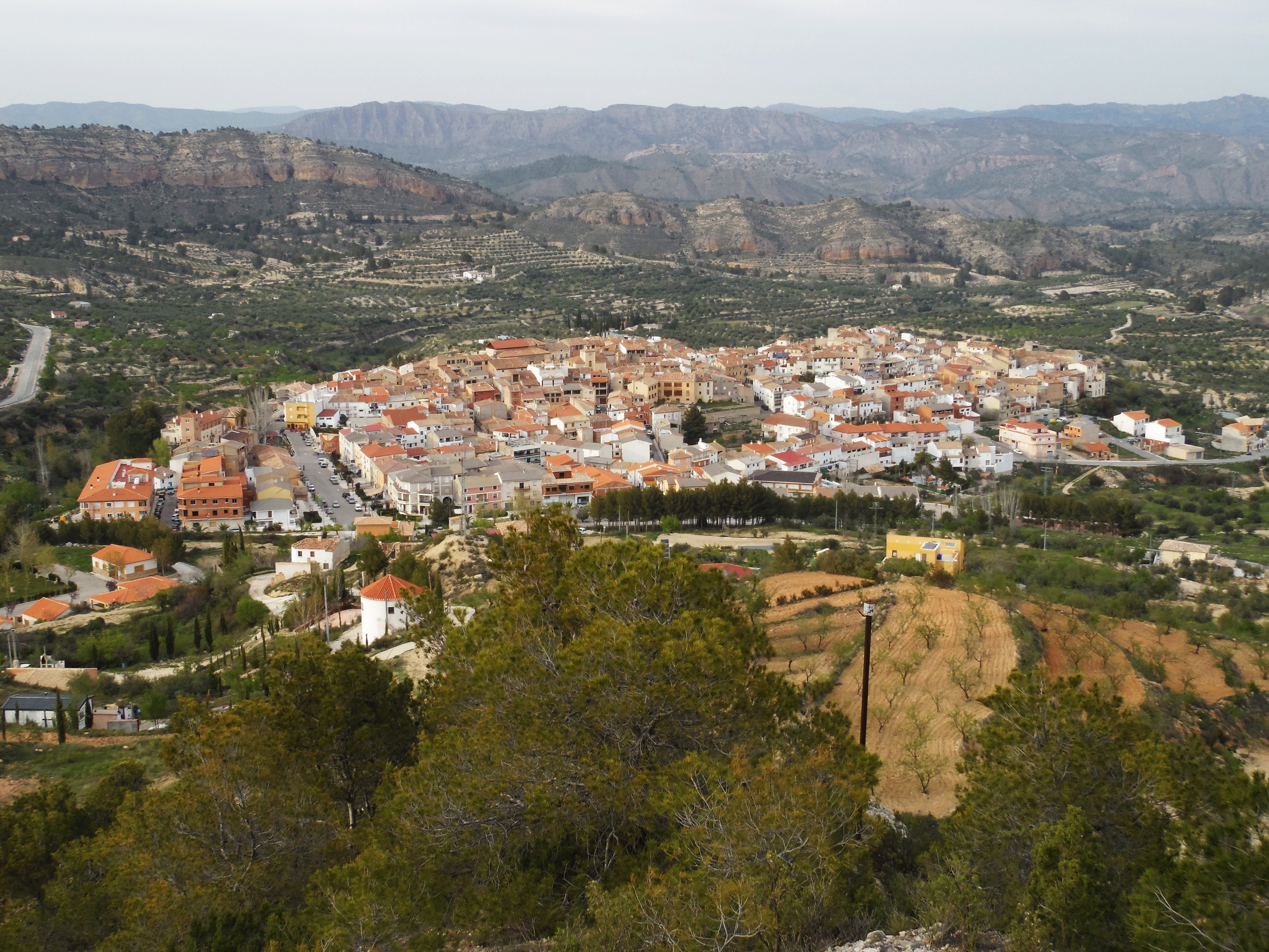 Sierra de Alcaraz y Segura y cañones del Segura y del Mundo This is a photography of a Site of Community Importance in Spain with the ID: ES4210008. Natura2000 entry, EEA entry